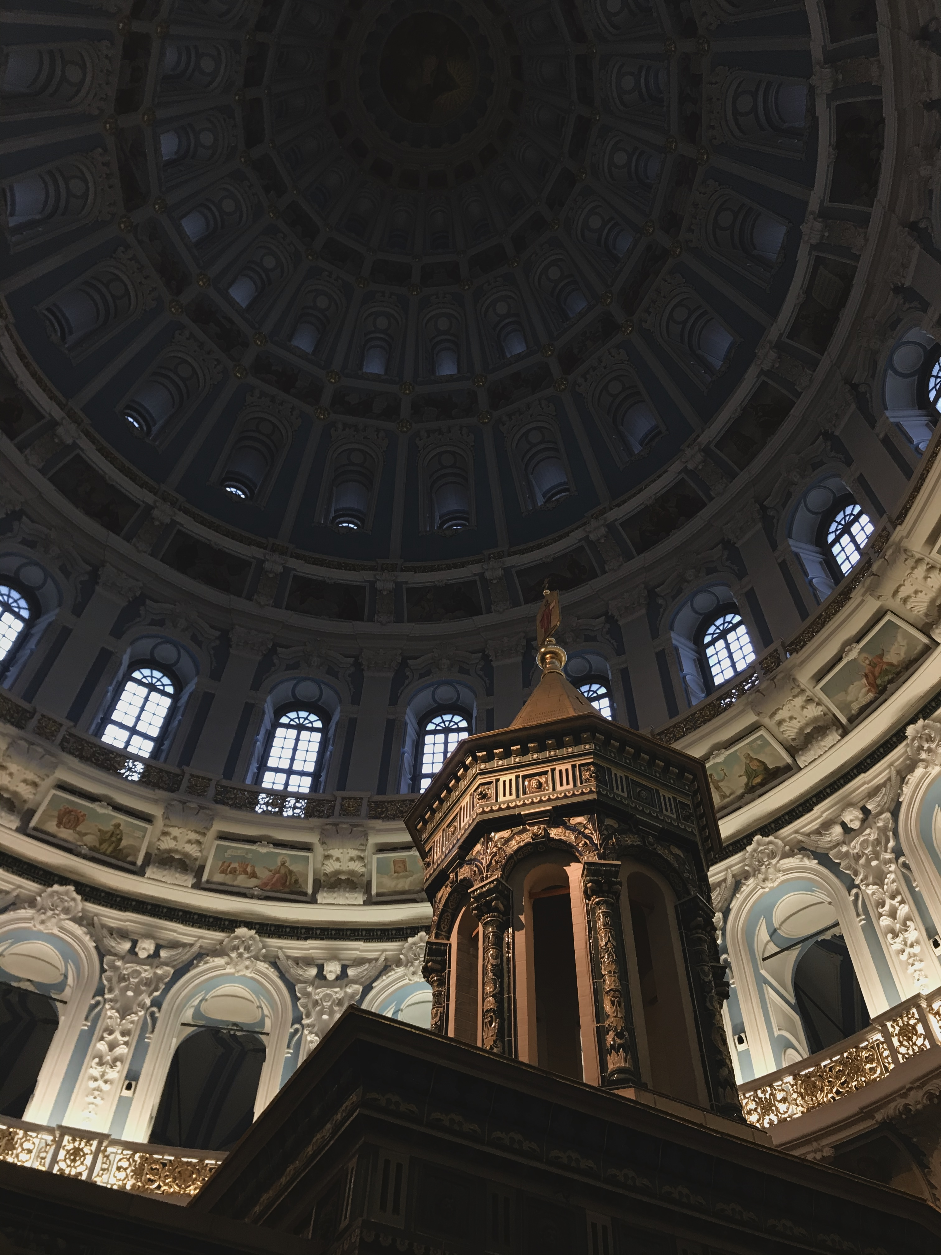 Шатёр ротонды Храма Воскресения Воскресенского Новоиерусалимского монастыря в Истре, вид изнутри